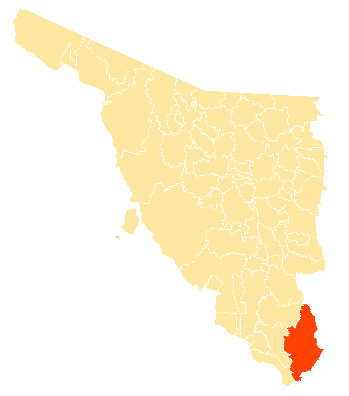 Municipio dentro de Sonora, México.